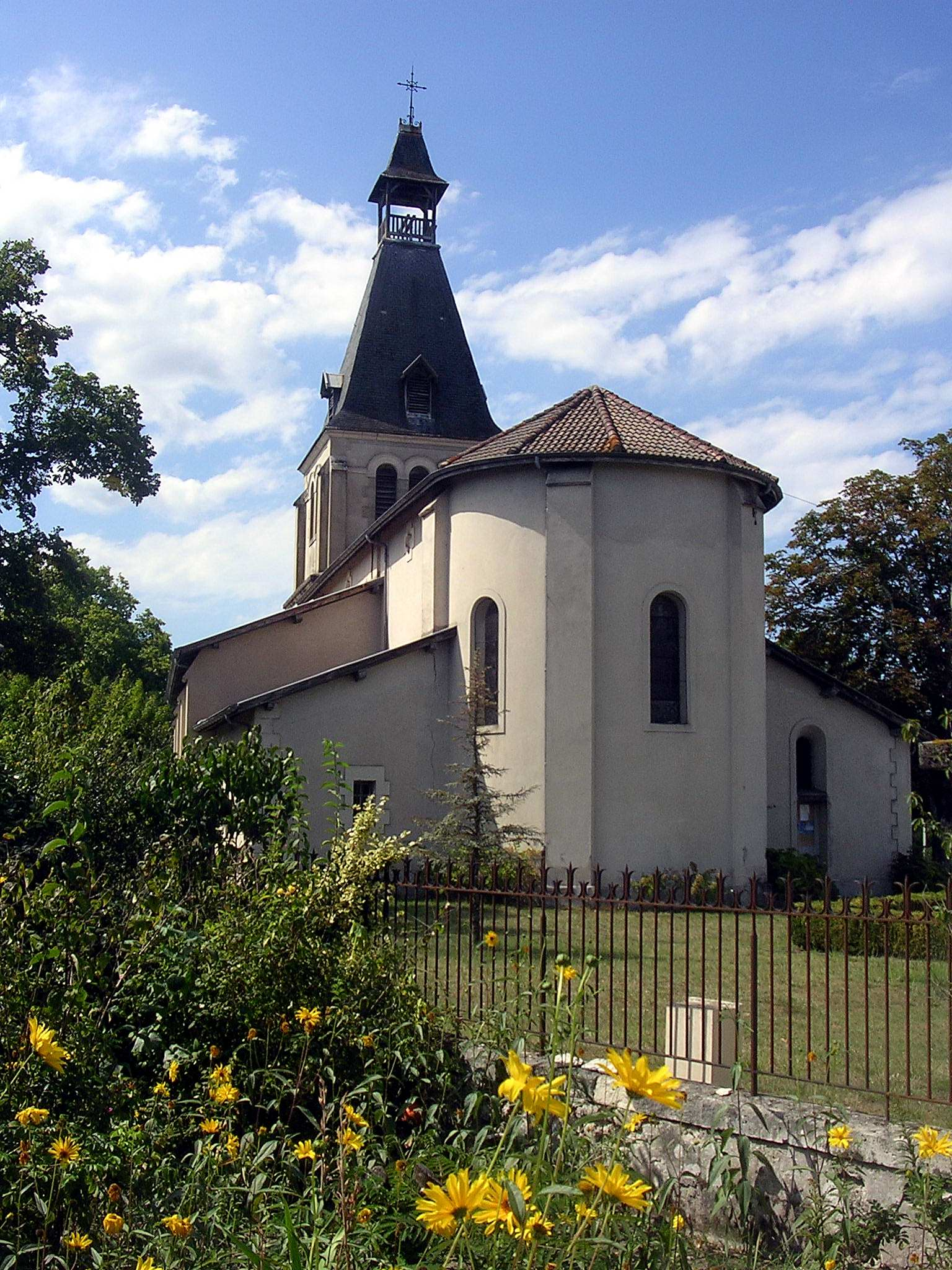 Eglise d'Escource, dans le département français des Landes